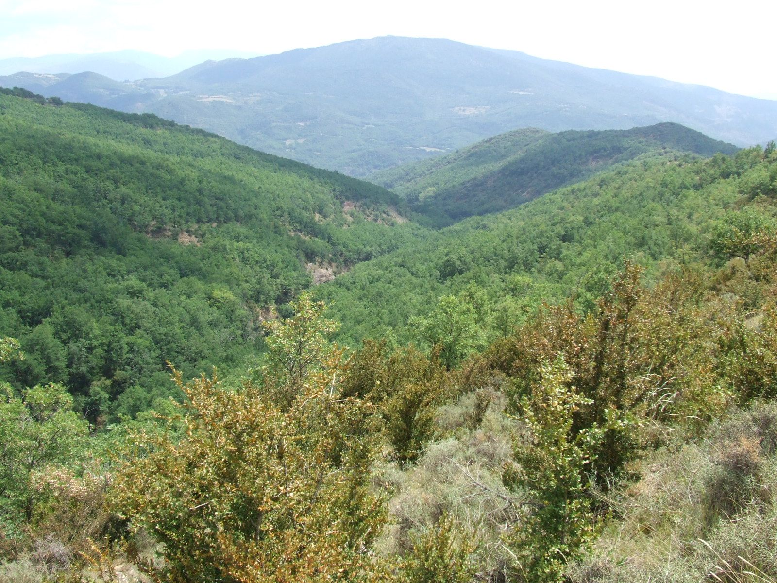 El barranc de Sant Genís (Sarroca de Bellera i Senterada, Pallars Jussà)